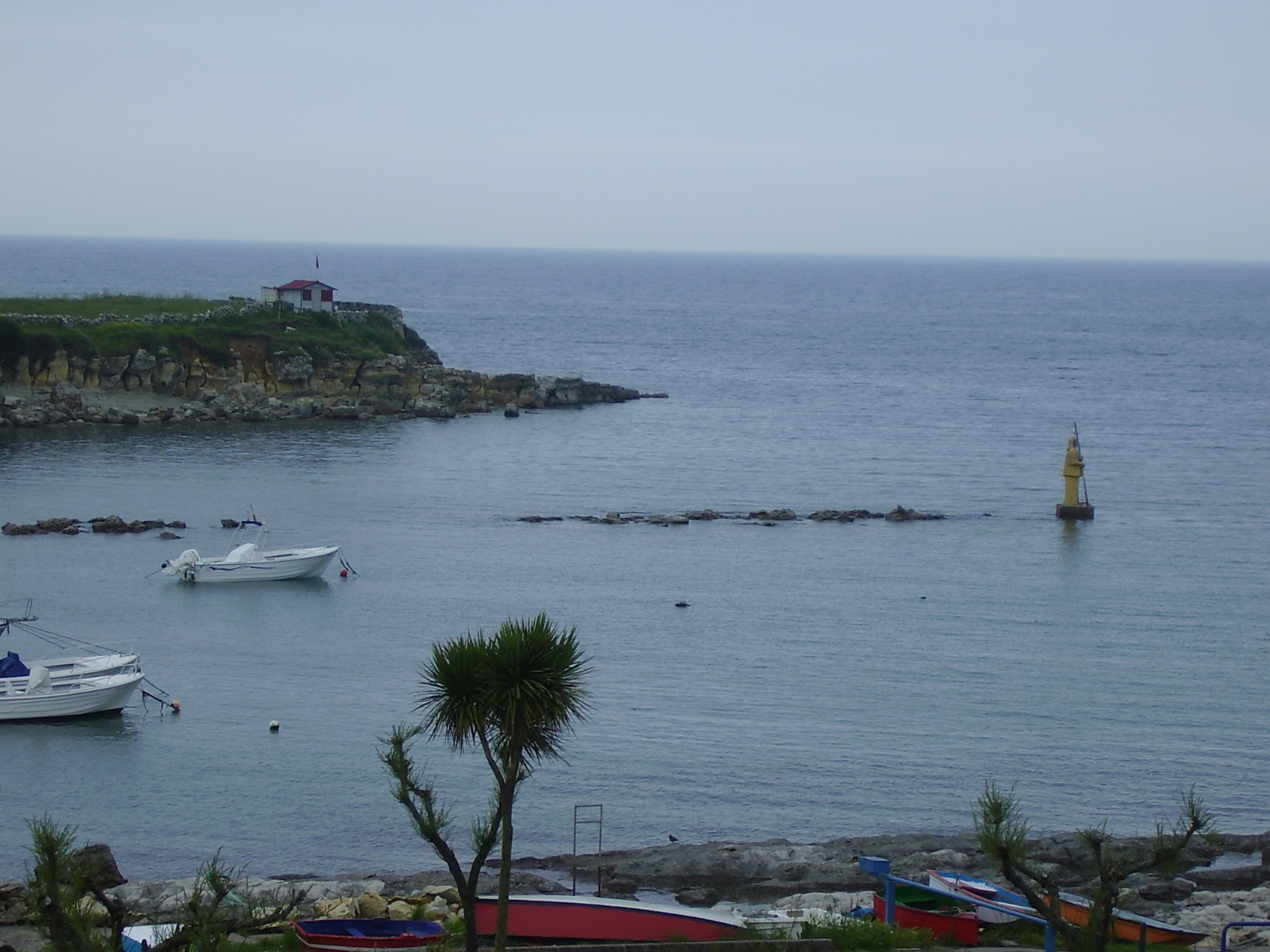 RPLl - 2006 Vista de la playa de La Maruca (Cueto, Santander, Cantabria) al atardecer.